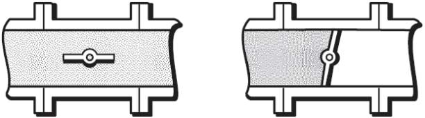 احد انواع الصممات ويدعى صمام الفراشة